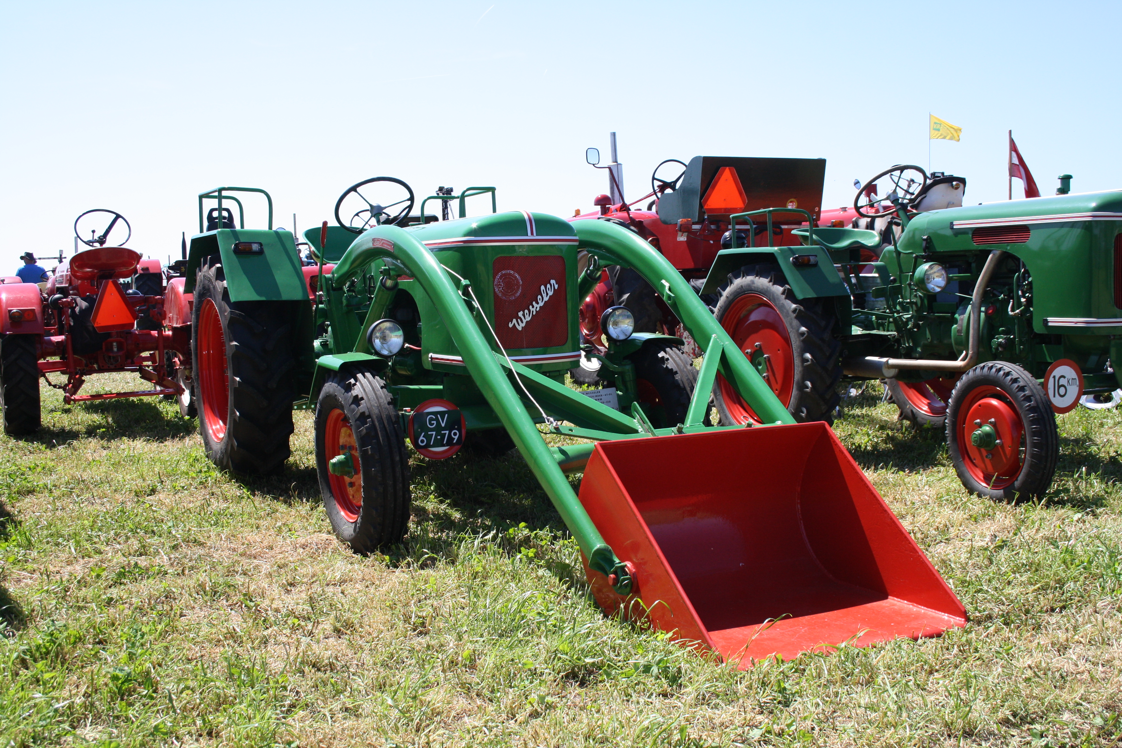 Texel - OTMV -2012 - Wesseler tractor - bouwjaar 1964